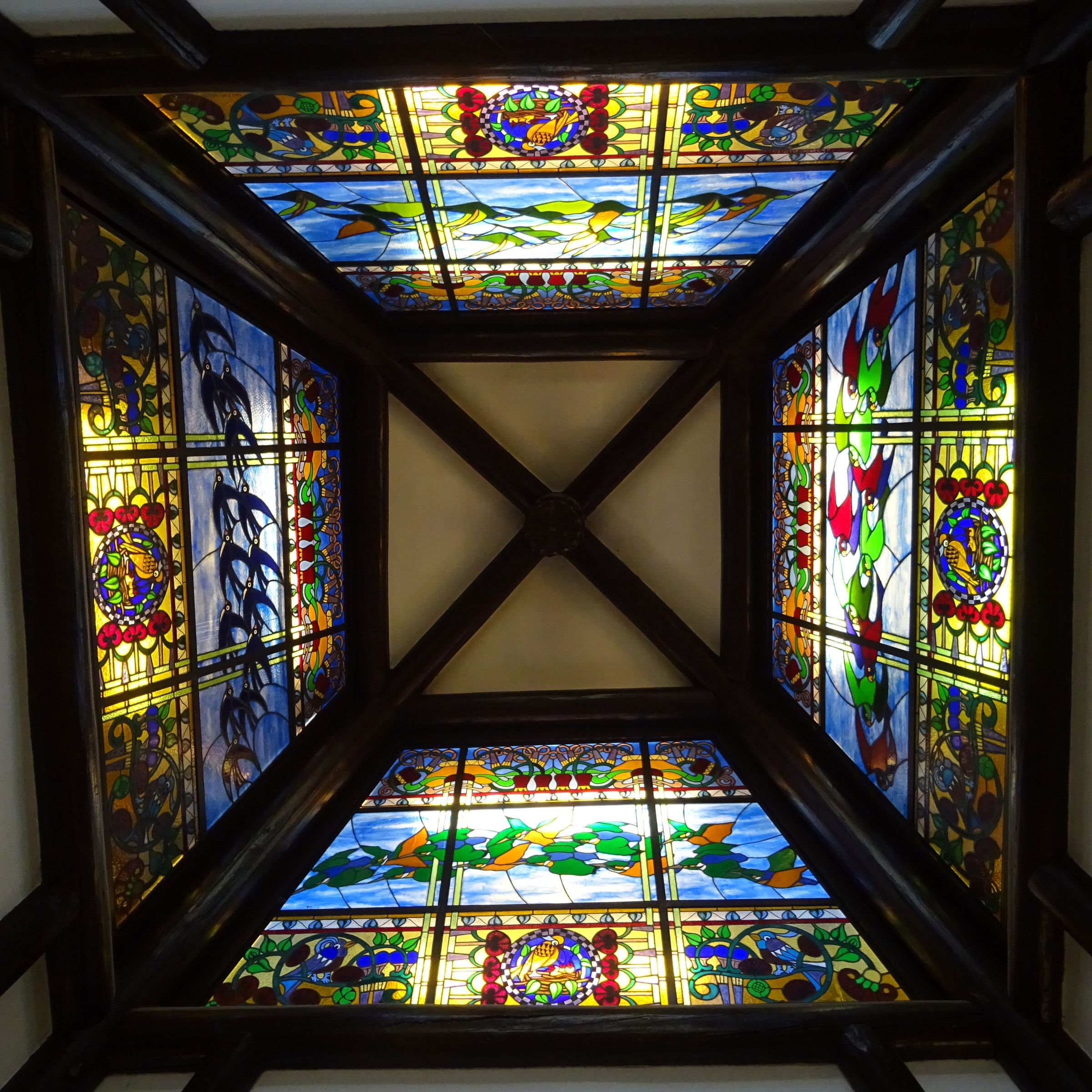 by